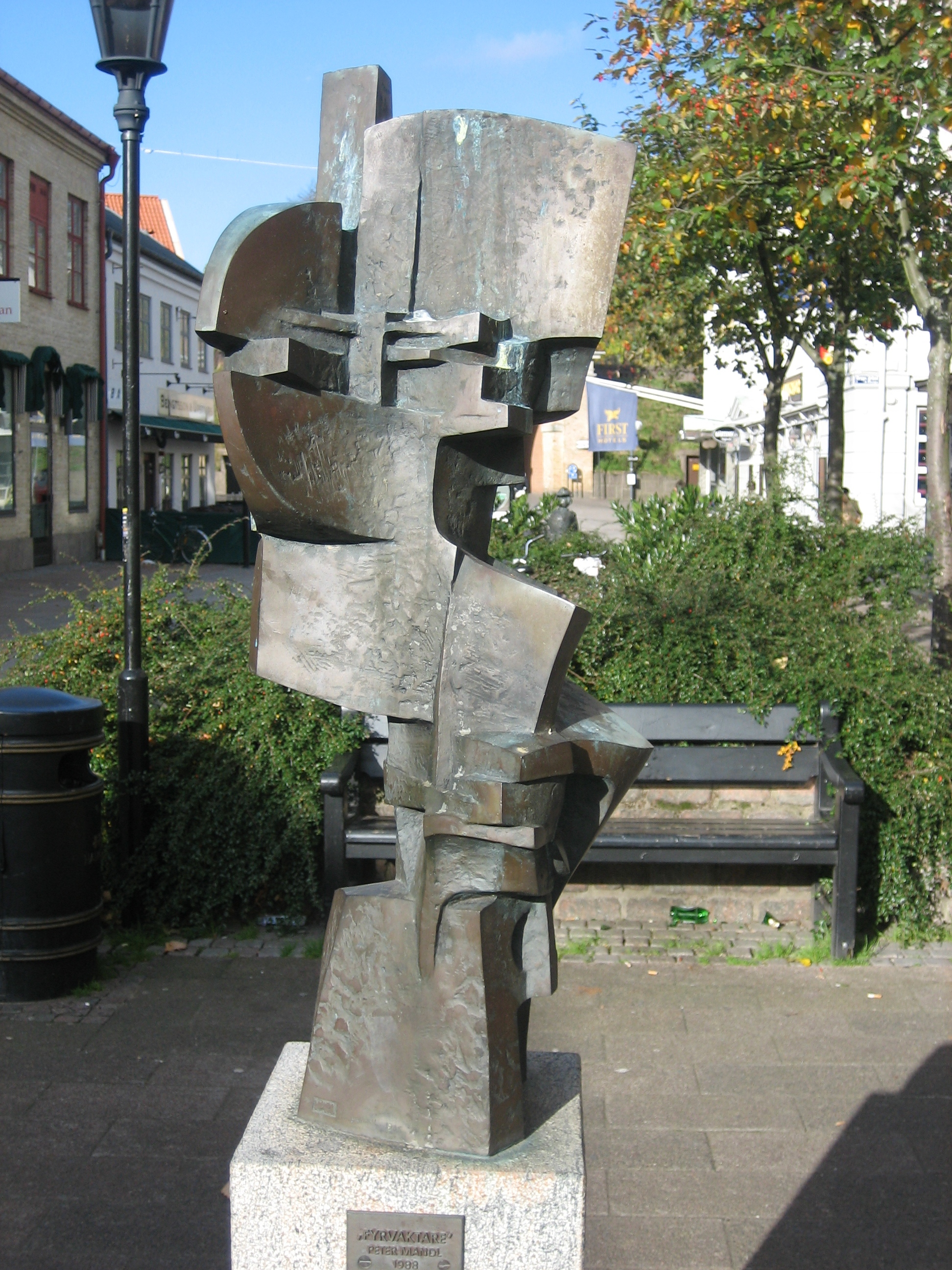 Fyrvaktare av Peter Mandl, Storgatan Halmstad.